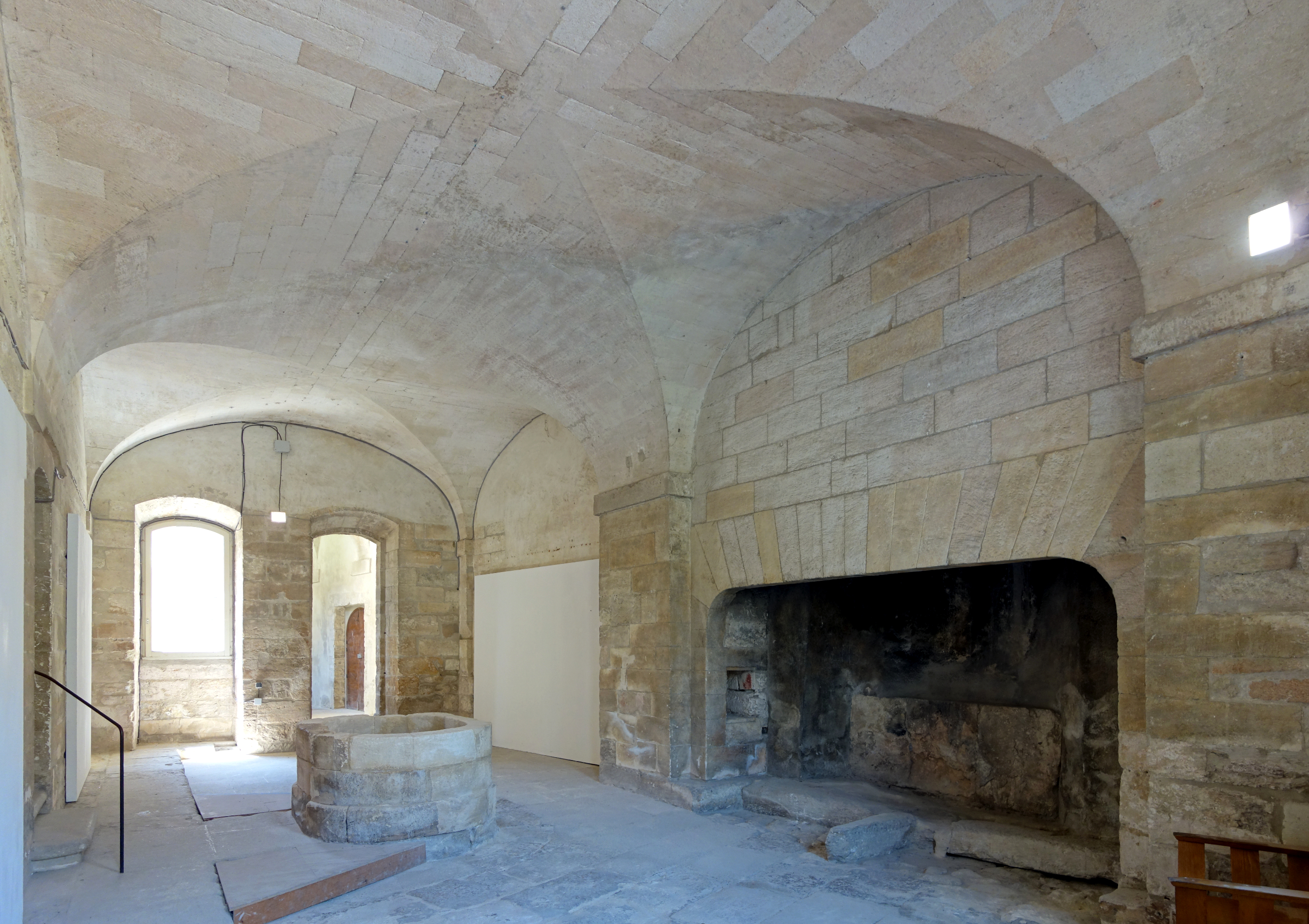 La bugade (buanderie) de la Chartreuse du Val de Bénédiction à Villeneuve-lès-Avignon.